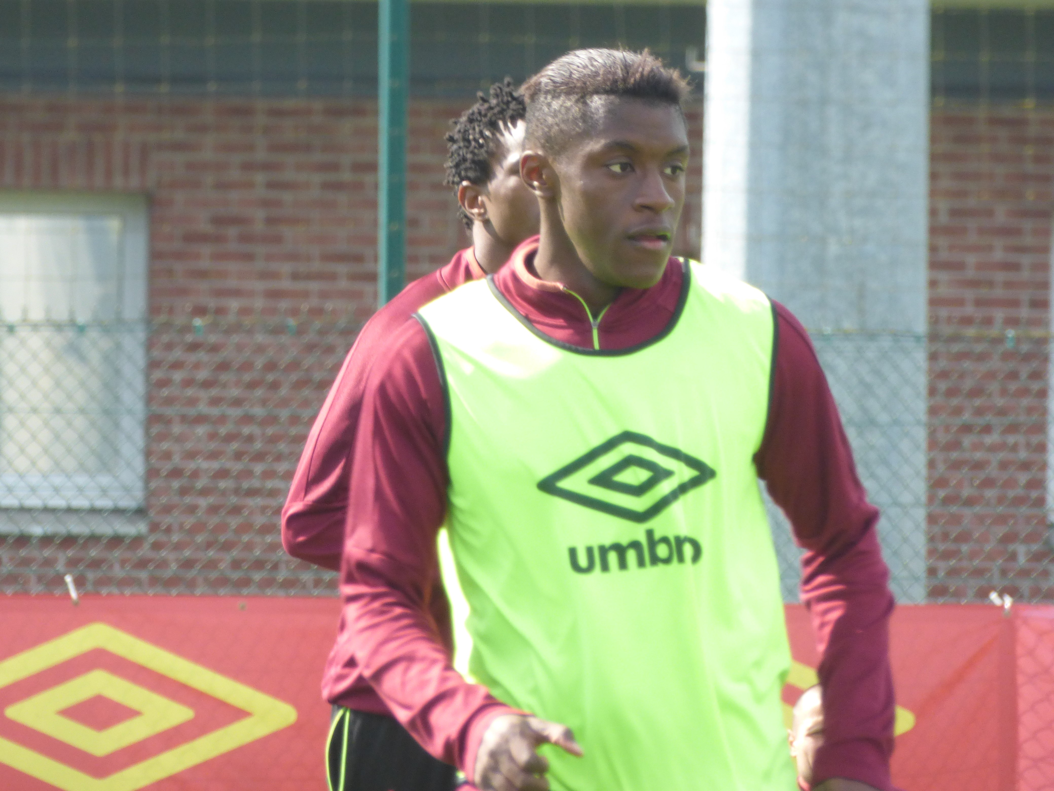 Jean-Ricner Bellegarde lors d'un entraînement public du Racing Club de Lens au Centre technique et sportif La Gaillette, le 2 mai 2018.